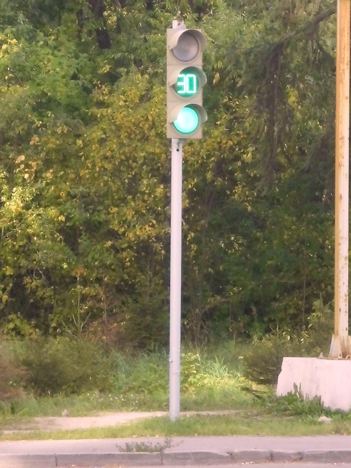 Автомобильный простой светодиодный светофор с обратным отсчётом времени (старого образца с круглыми глазками). Включен зелёный сигнал, осталось 30 сек. до переключения.